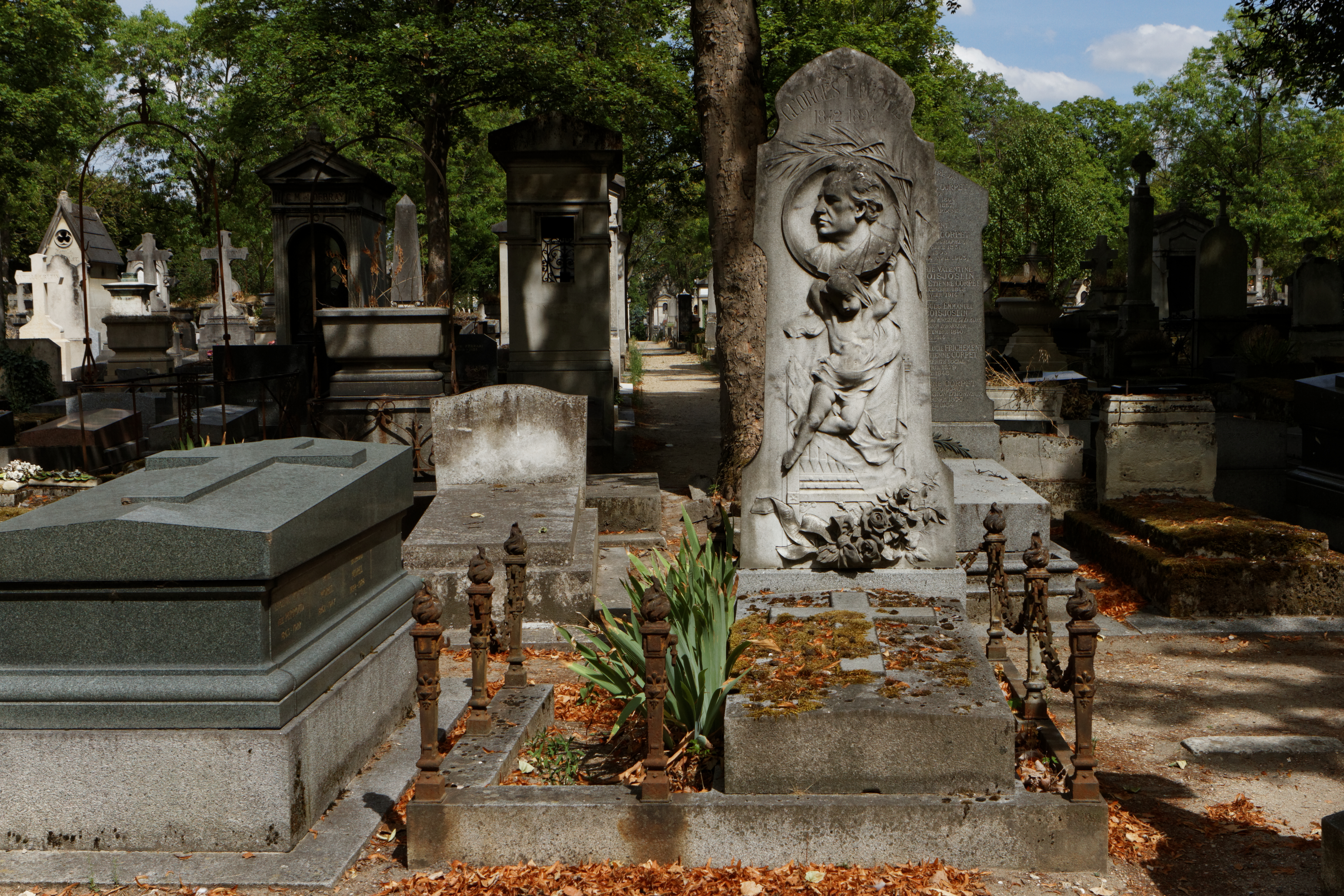 Sépulture du compositeur de musique Georges Lamothe (1842-1894). « Stèle en marbre blanc. Dans la face antérieure est sculpté un médaillon soutenu par un enfant. Au bas, fleurs et banderole sur laquelle est gravé : « À mon cher mari. » Signé : H. Allouard, 1895. » (Jouin, 1897)